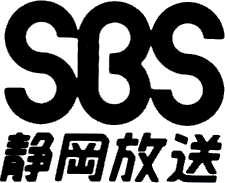 静岡放送の2代目ロゴ